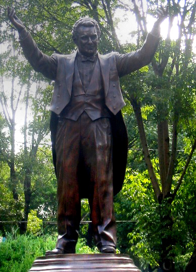 Plácido Domingo's statue in Mexico City